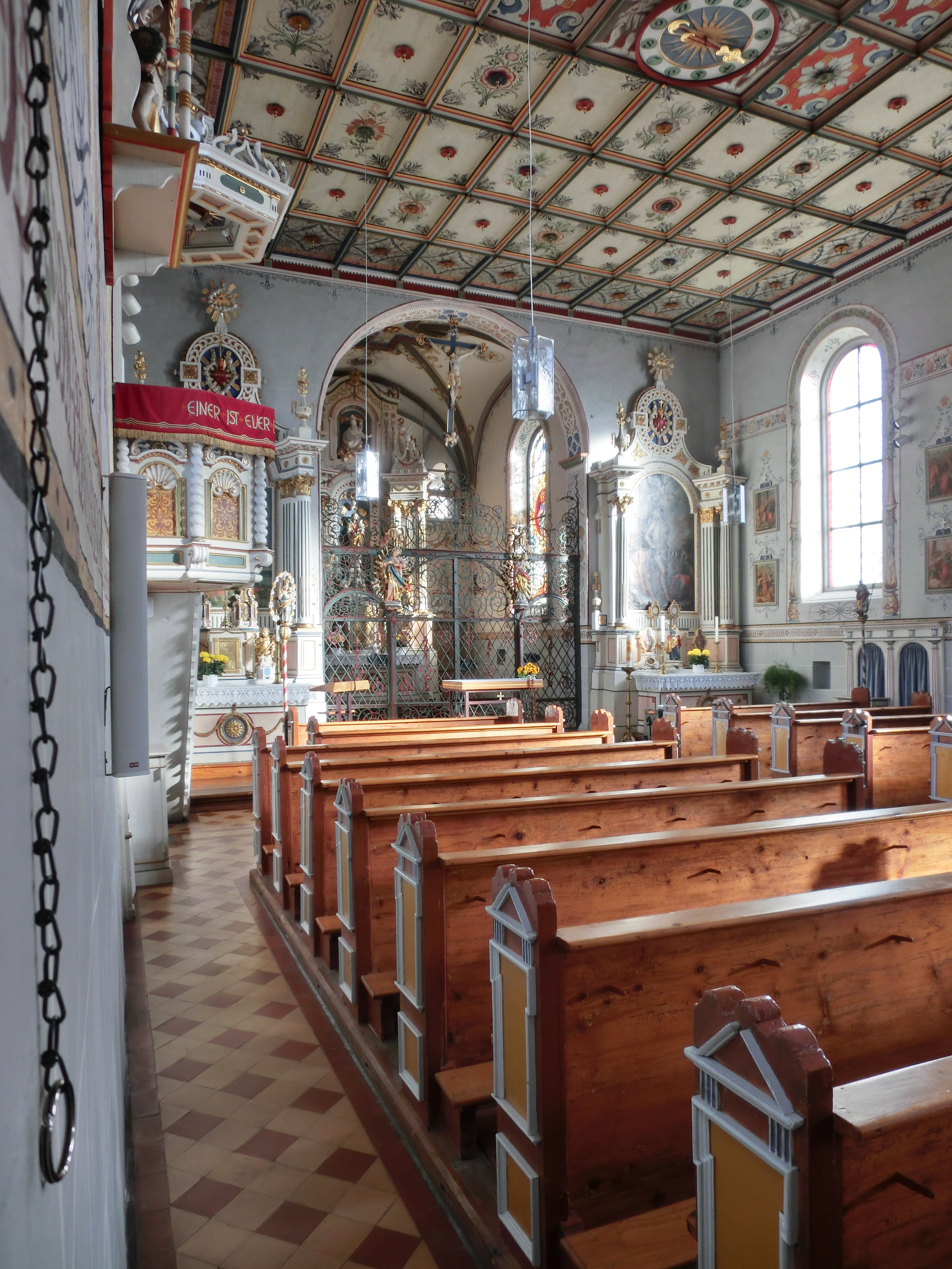 Deutschland - Baden-Württemberg - Bodenseekreis - Überlingen - Hödingen: St. Bartholomäus, Innenansicht